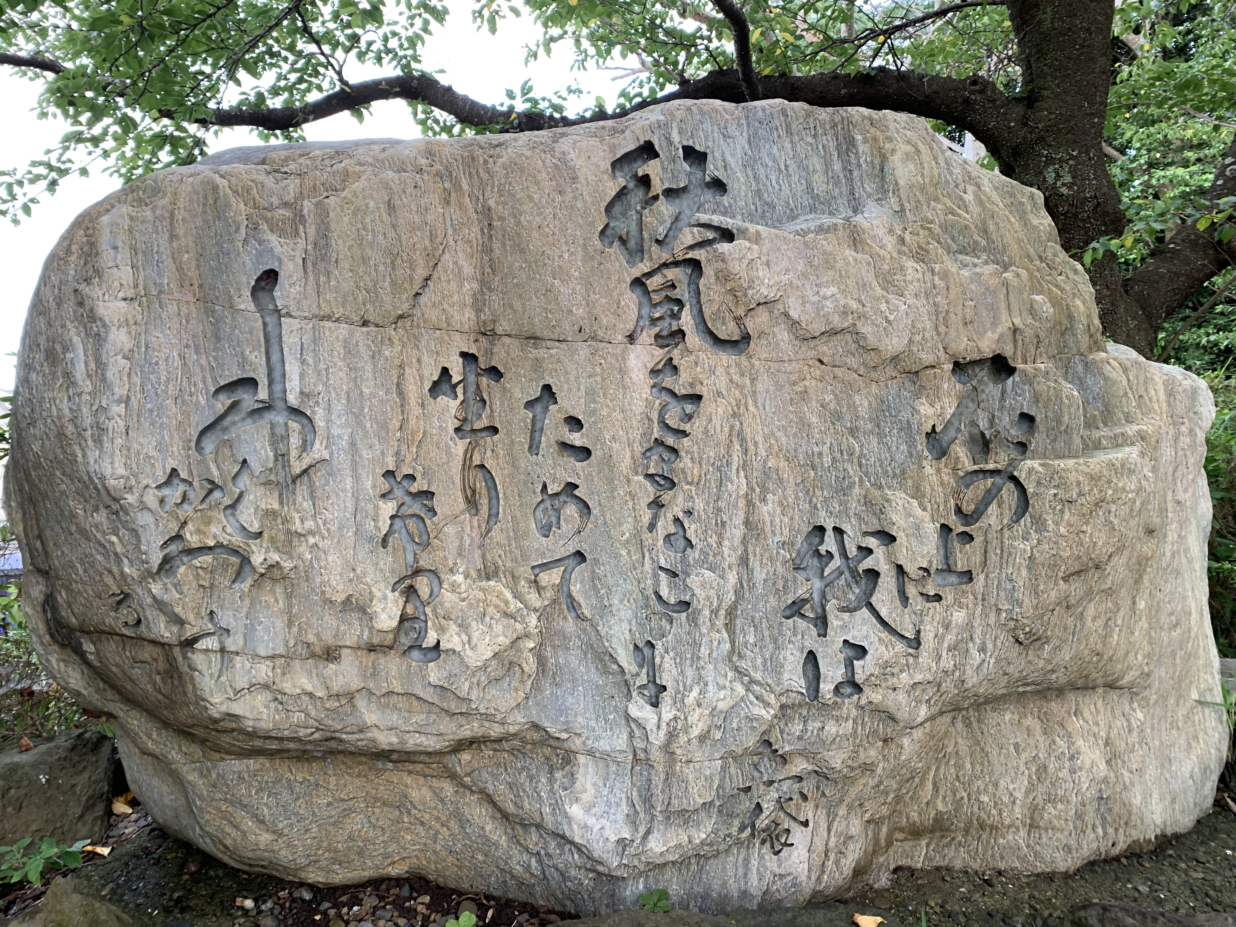 千葉県木更津市、太田山公園にある細井魚袋歌碑。1957年建立。（2019年7月撮影）